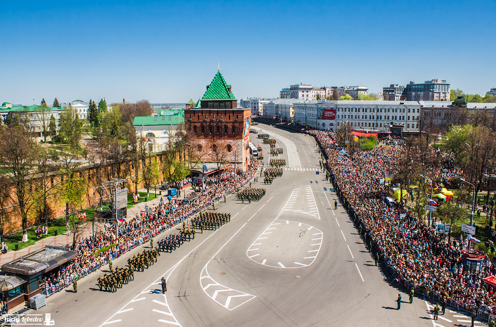 Парад в честь 70-летия Победы в Великой Отечественной войне. Нижний Новгород. Площадь Минина и Пожарского